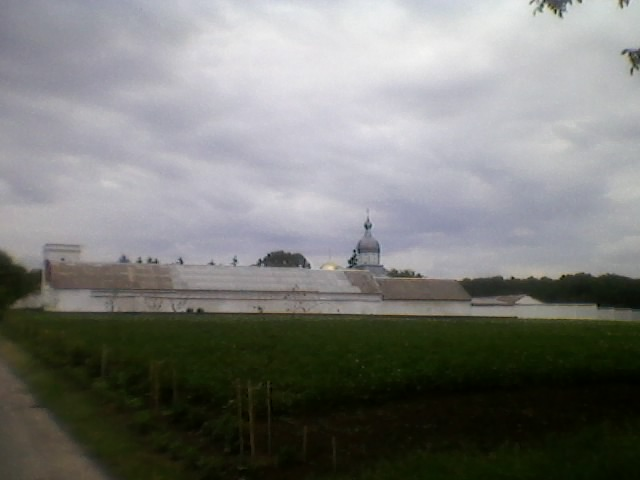 Лебединський монастир, Черкаська область